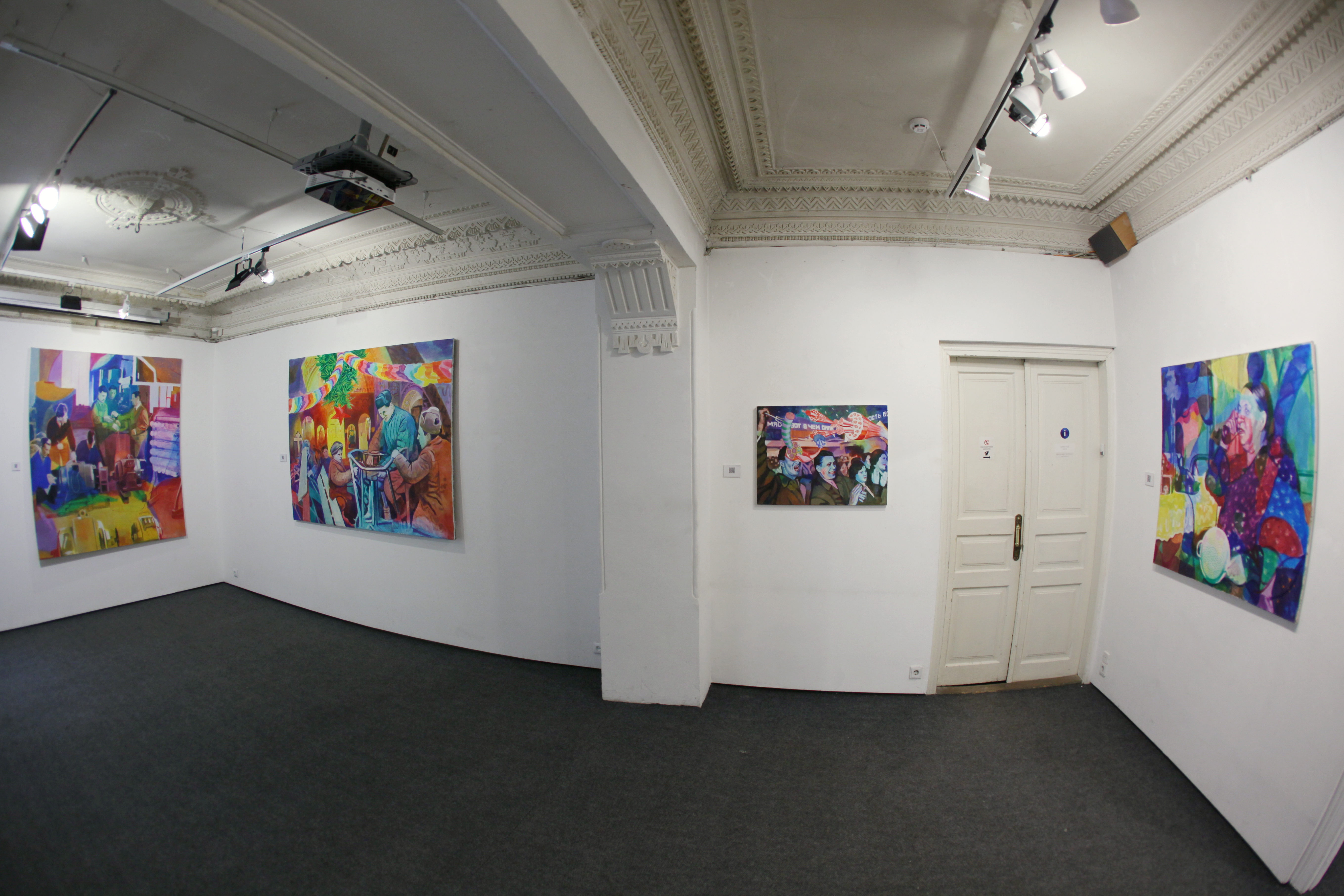 Karas Gallery Карась Галерея Андрій Сидоренко проект "Клінічна картина" 2018